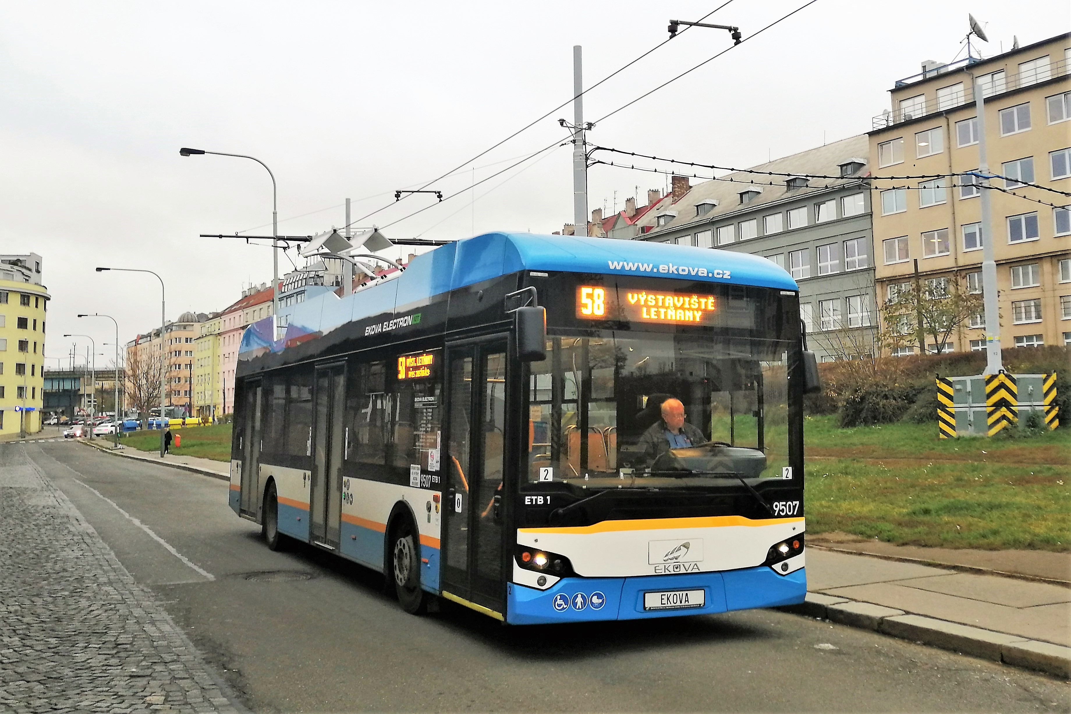 Trolejbus Ekova Electron 12T v obratisku Palmovka nasadení na linku 58 predĺženú po Výstaviště Letňany z dôvodu konania veľtrhu Czechbus.